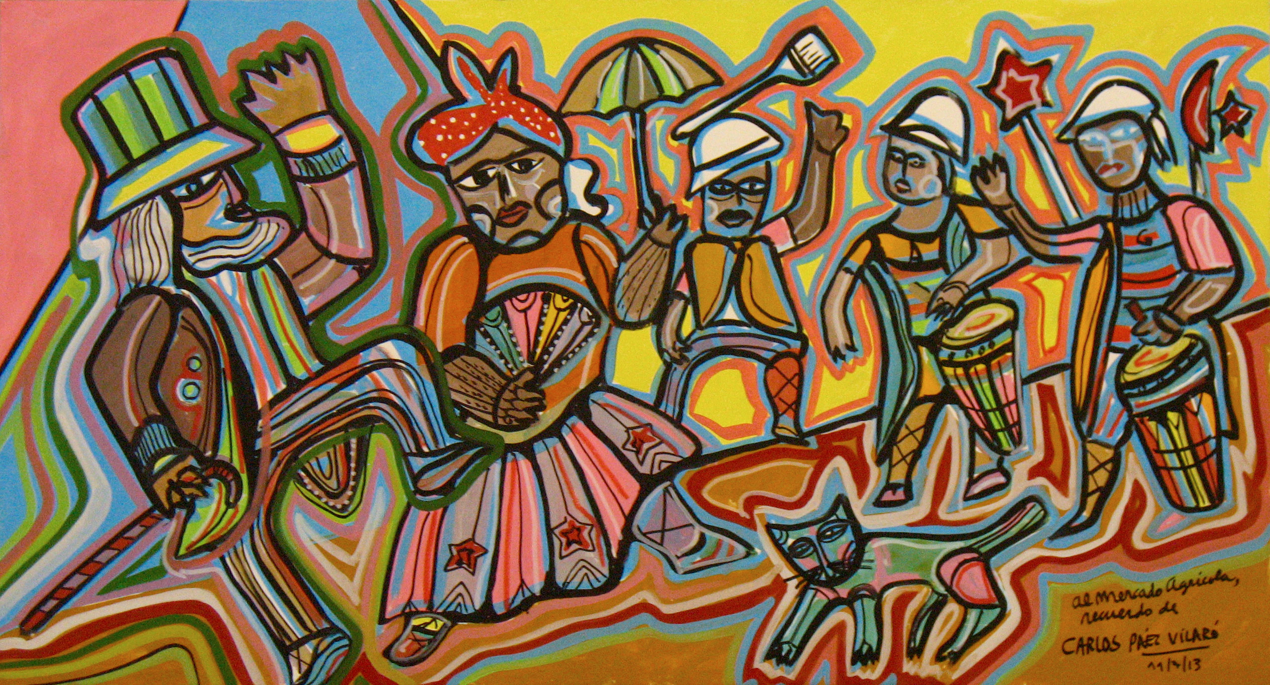 Mercado Agrícola. Ubicada en el departamento de Montevideo